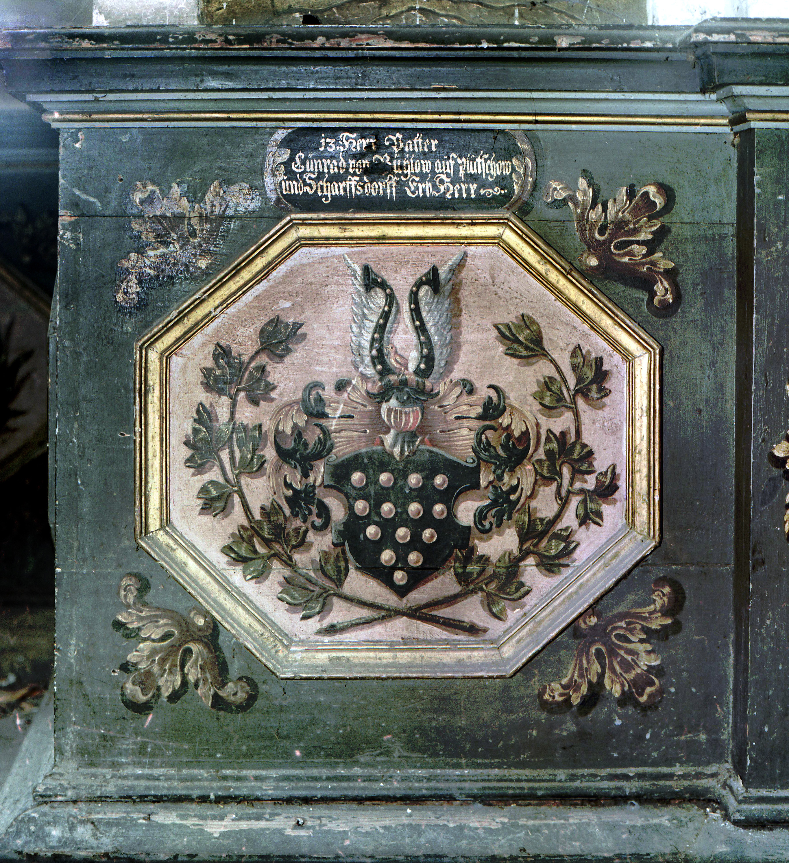 24.09.1987 2561 Hohen Luckow (Satow): Herrenhaus Hohen Luckow (GMP: 53.983689,11.961824), erbaut 1707-1708 unter Christoph von Bassewitz. In der DDR Volkseigenes Gut. Rittersaal im OG mit unterhalb der Fenster umlaufenden hölzernen Brüstungsverkleidung mit gemalten Wappentafeln mecklenburgischer Adelsgeschlechter. Inschrift: "13. Herr Vatter Cunrad von Bühlow auf Plütschow und Scharffsdorf ErbHerr" 19870924B04.jpg]19870924555NR.JPG(c)Blobelt